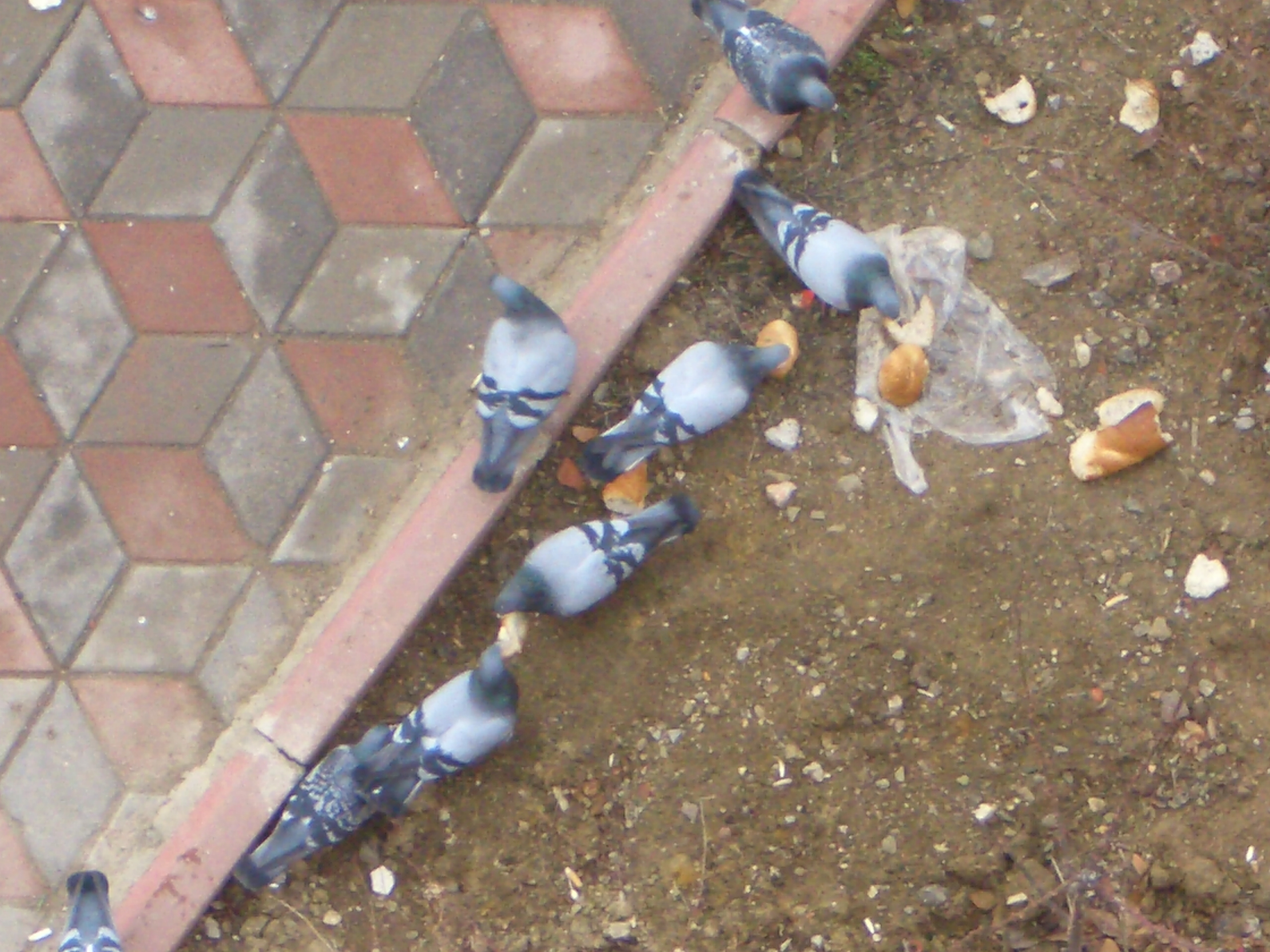 Ankara'da güvercinler.